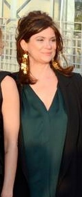 Anne-Dominique Toussaint au festival du film de Cabourg